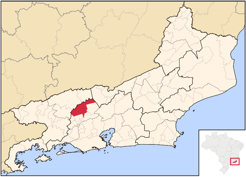 Localização do município de Vassouras no estado do Rio de Janeiro.